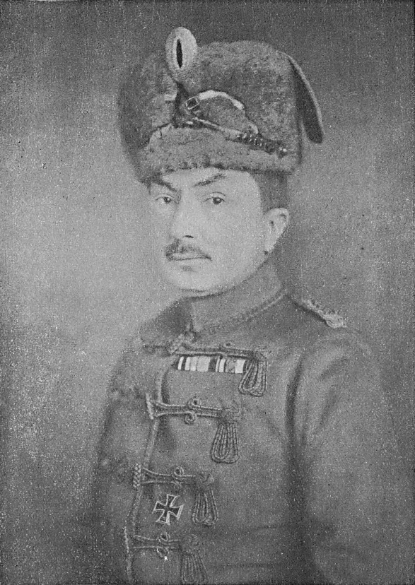 Podpułkownik K. Raszewski, dowódca 16 pułku Husarów Pruskich